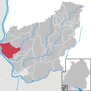 Efringen-Kirchen, Landkreis Lörrach, Baden-Württemberg